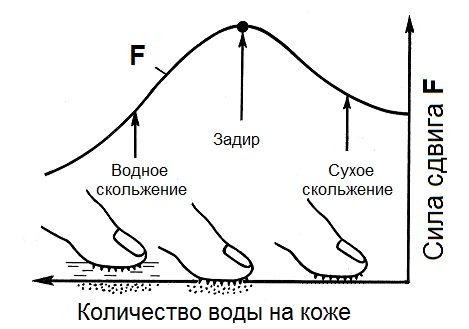 Мытье